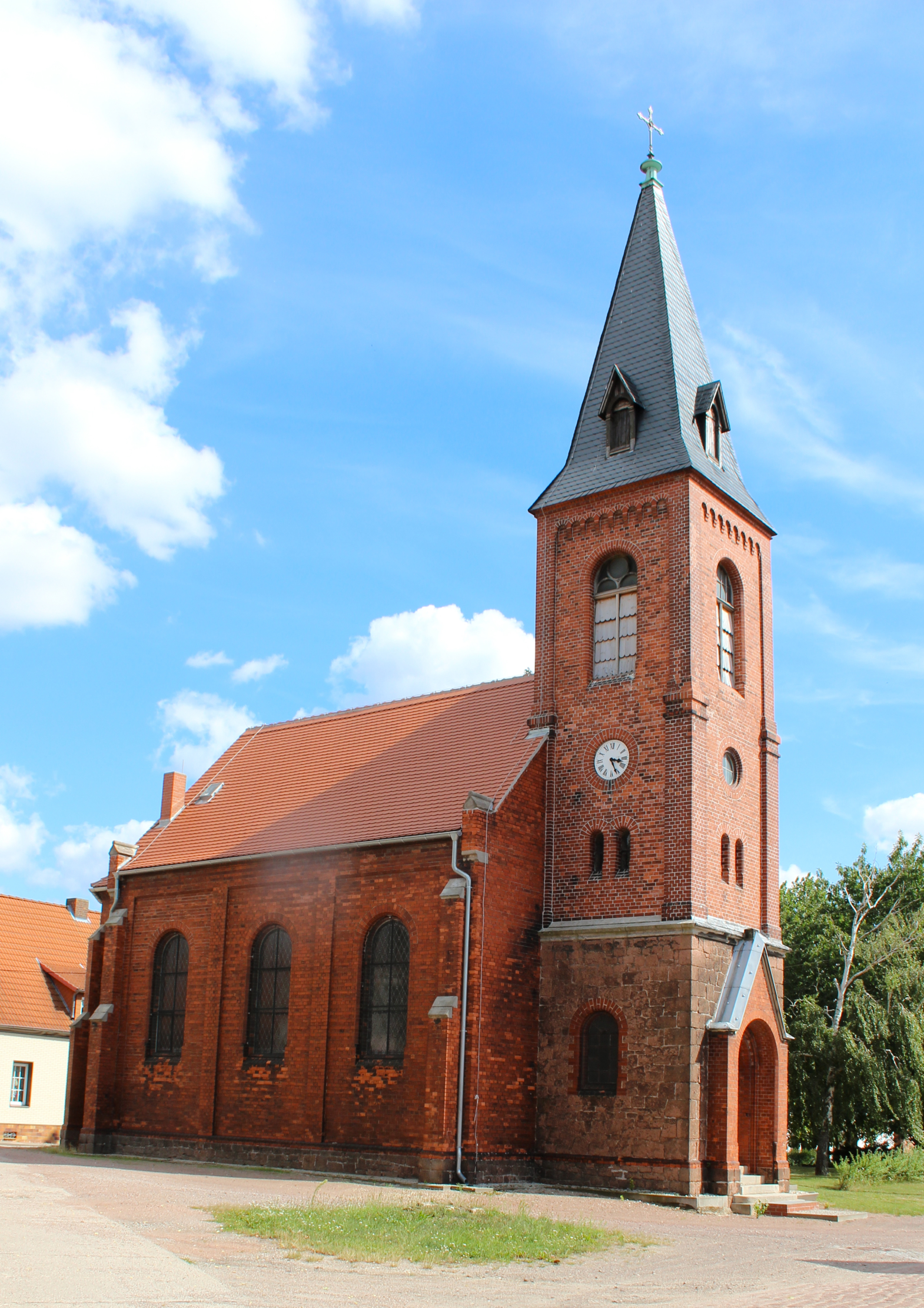 Kirche in Riesdorf ist ein Ortsteil der Stadt Südliches Anhalt im Landkreis Anhalt-Bitterfeld in Sachsen-Anhalt.